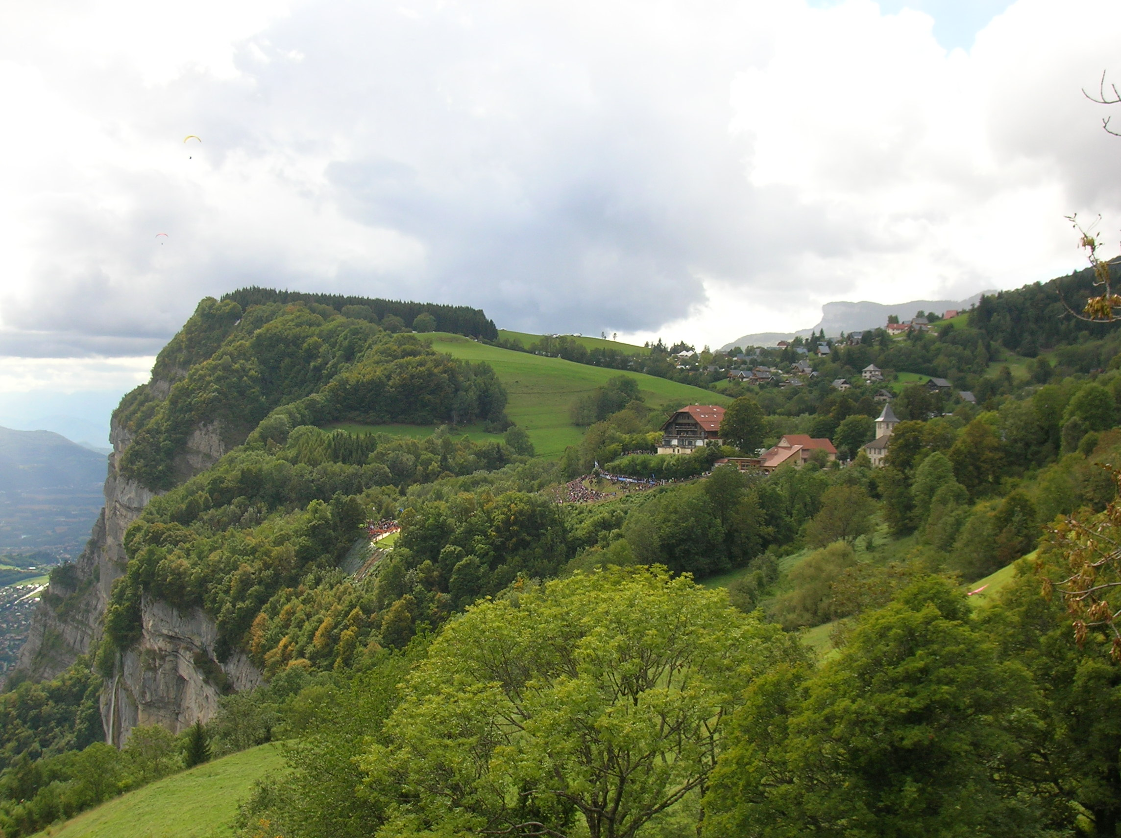 St Hilaire du Touvet, Isère, France. Coupe Icare 2015